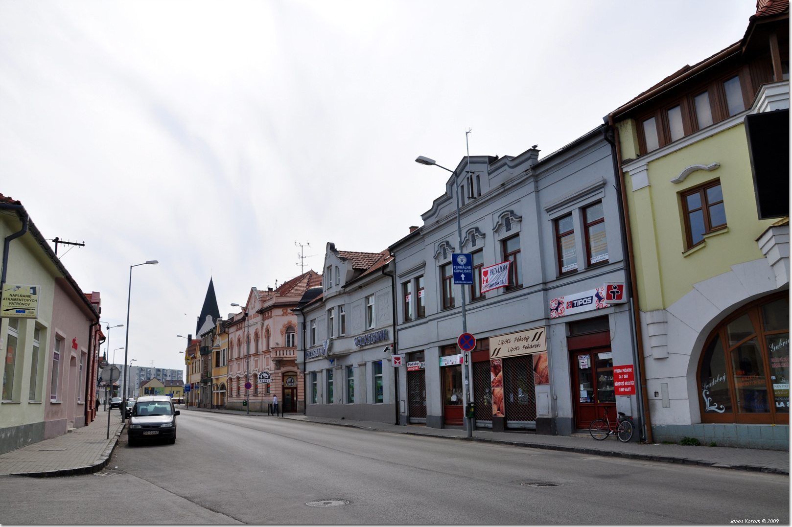 Dunajská Streda